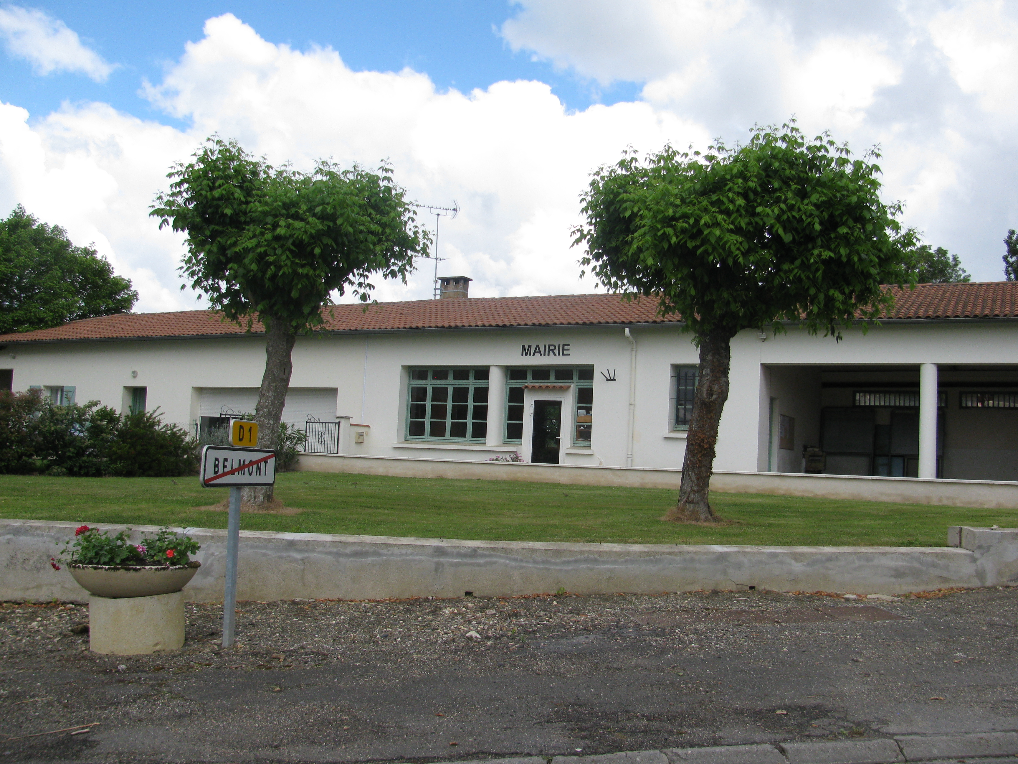 Mairie de Belmont (Gers)